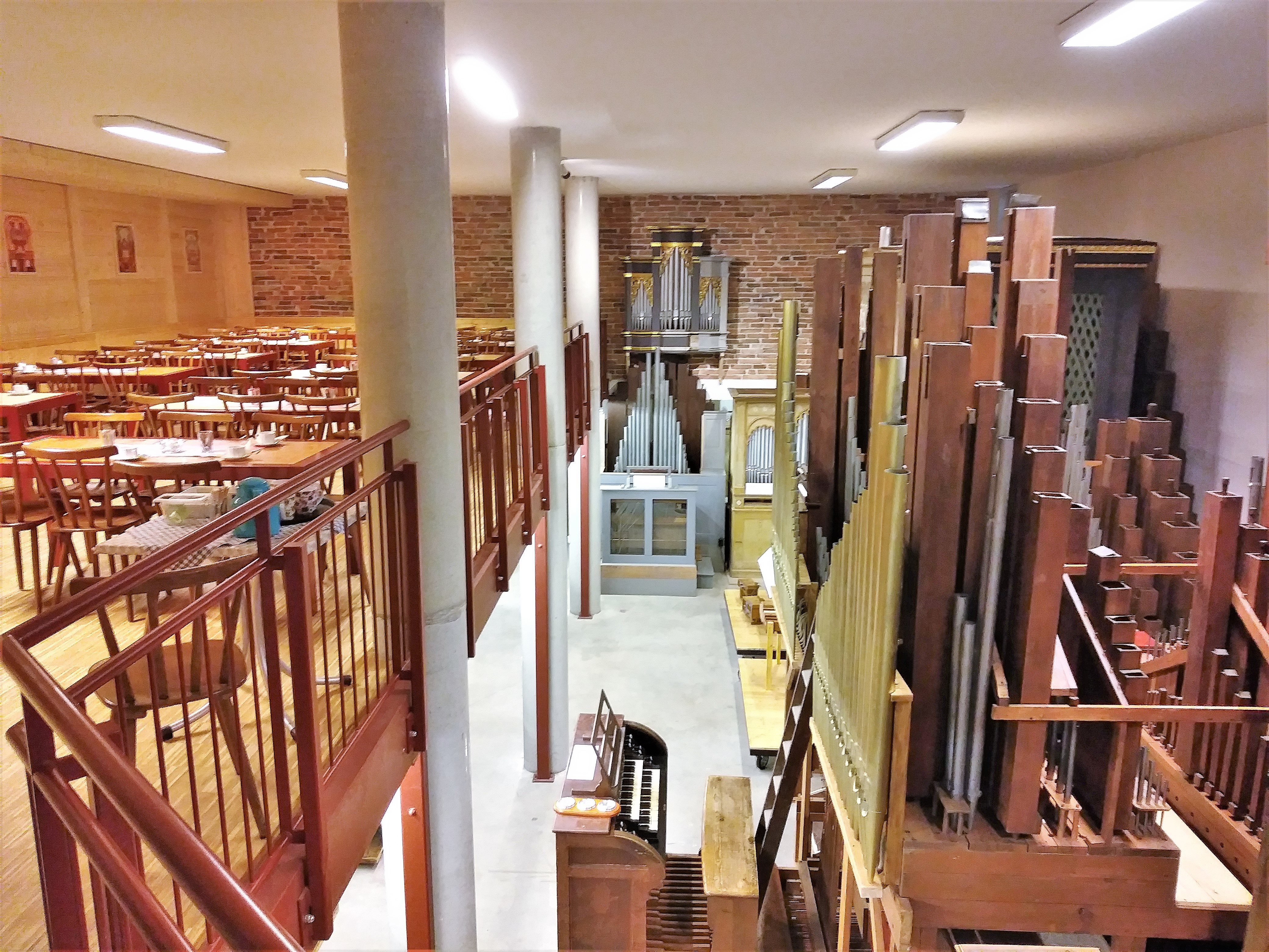 Orgelzentrum Valley